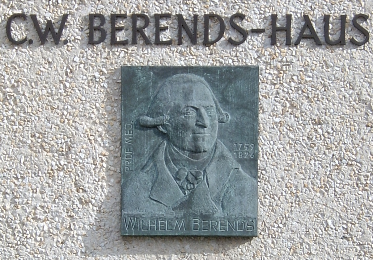 Schild am Wohnhaus in Frankfurt (Oder) im Studentendorf Mühlenweg. Dargestellt ist der Rektor der Viadrina Carl August Wilhelm Berends (19. April 1759 Anklam, gest. 01. Dezember 1826 Berlin)